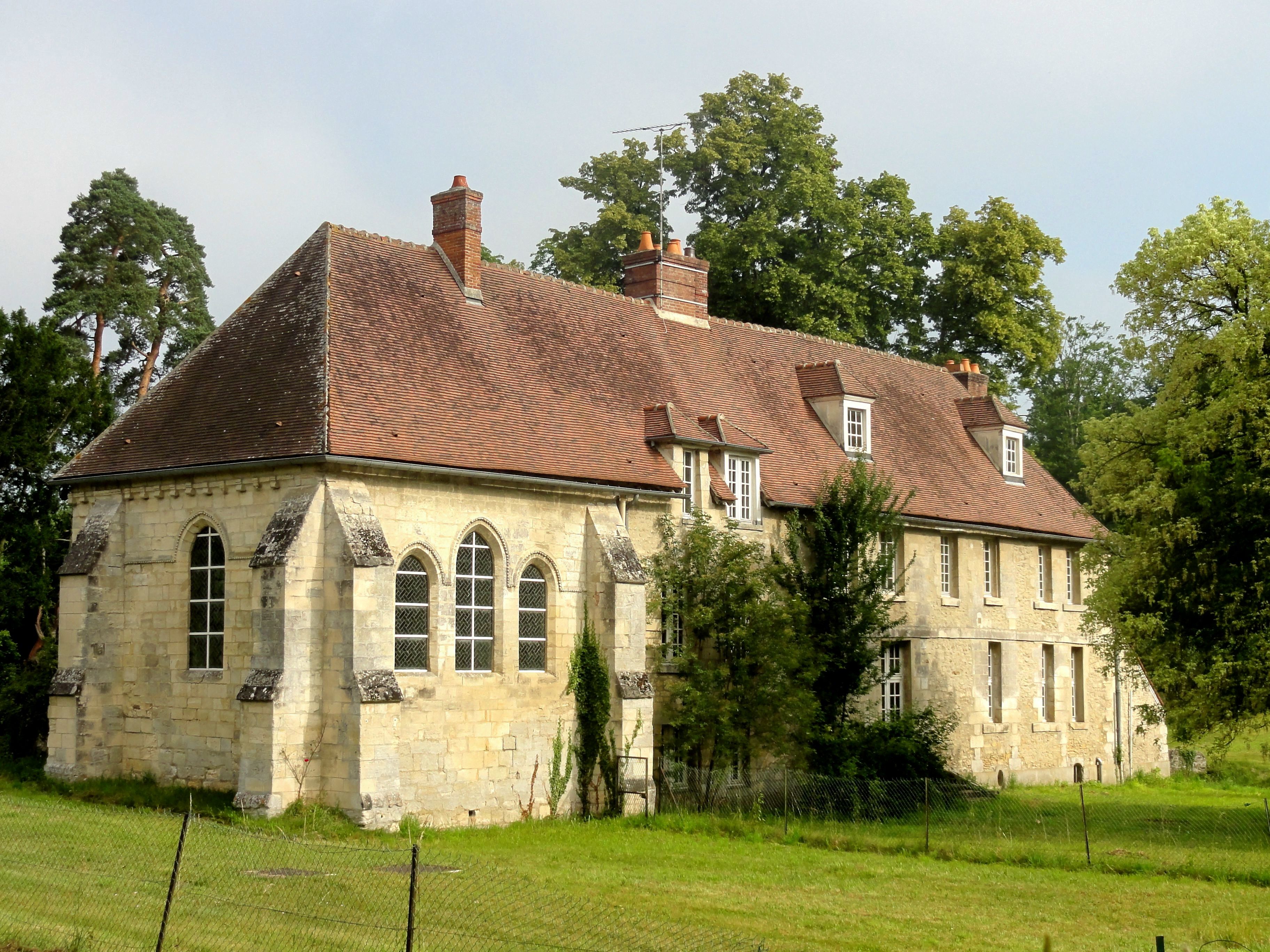 Poste forestier de Sainte-Perrine.